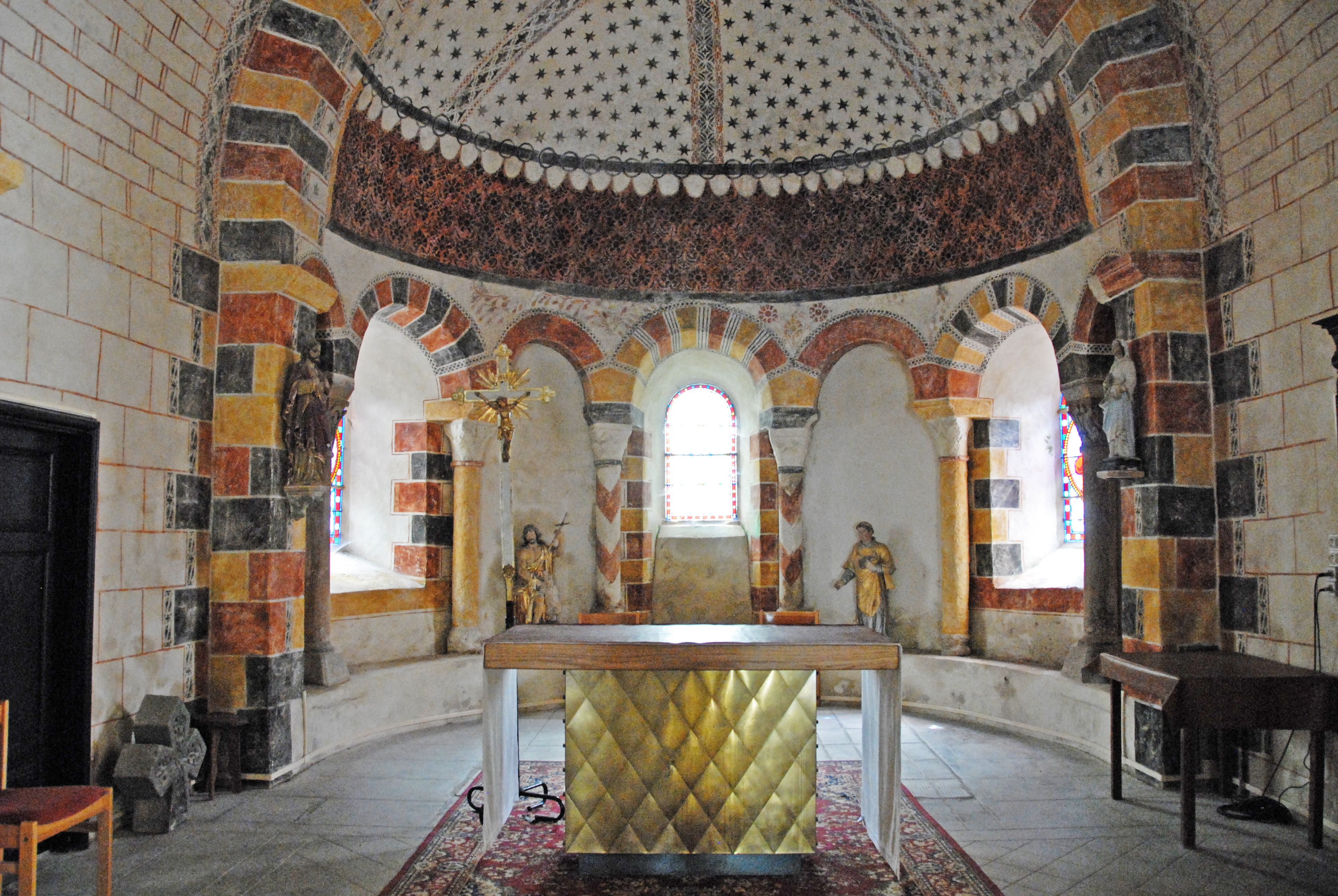 Dorfkirche Chambon-sur-Lac, Chorapsis mit Arkadenkranz